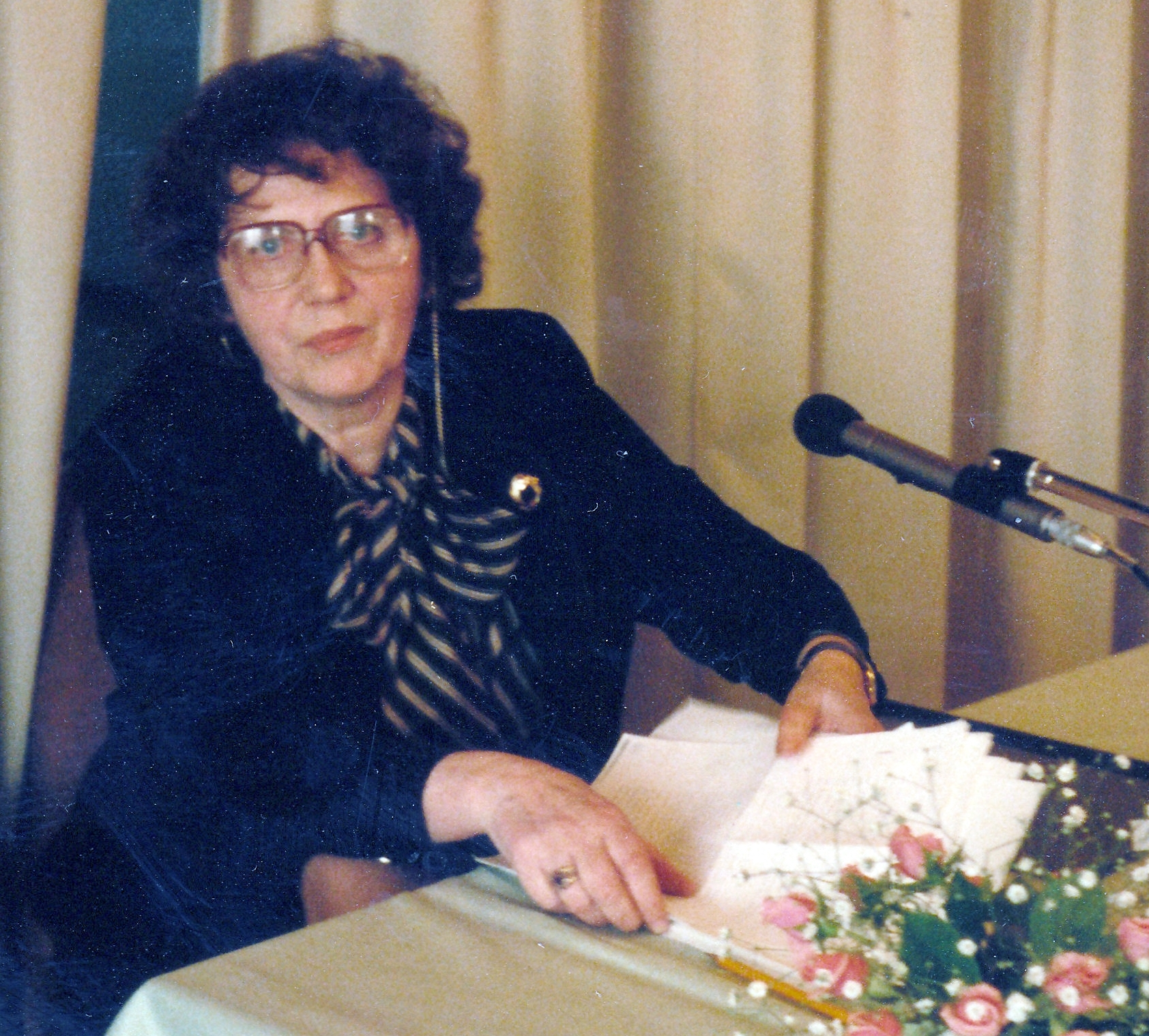 Die Malerin, Dichterin Eleonore Lingnau Kluge bei einer Ausstellungseröffnung und Lesung in der Feddersen Stiftung/Hamburg 1986